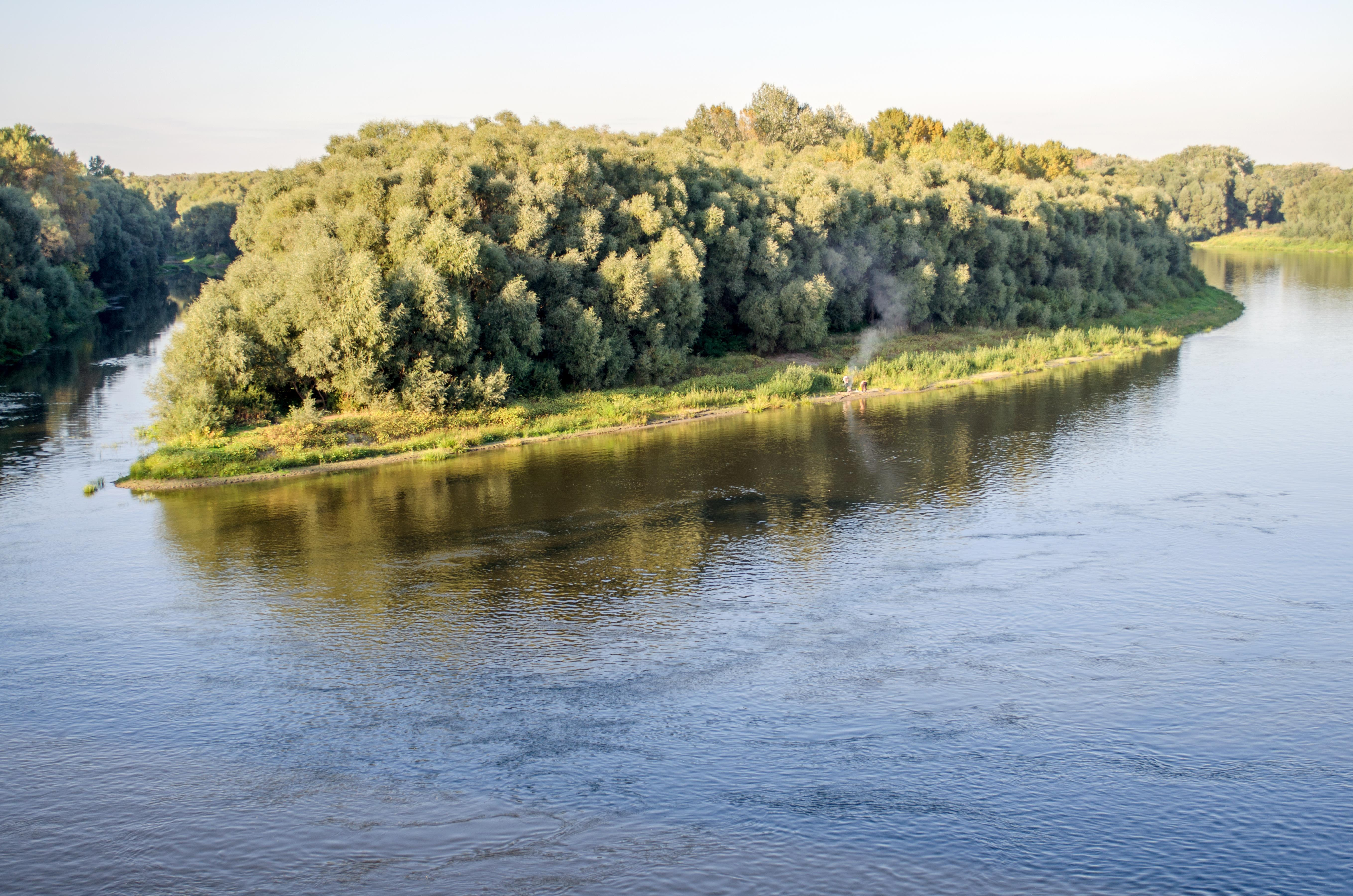 Поселення „Телячий острів”, Чернігів, за 2,3 км на пд-пд-сх від півд. околиці міста (Валу)